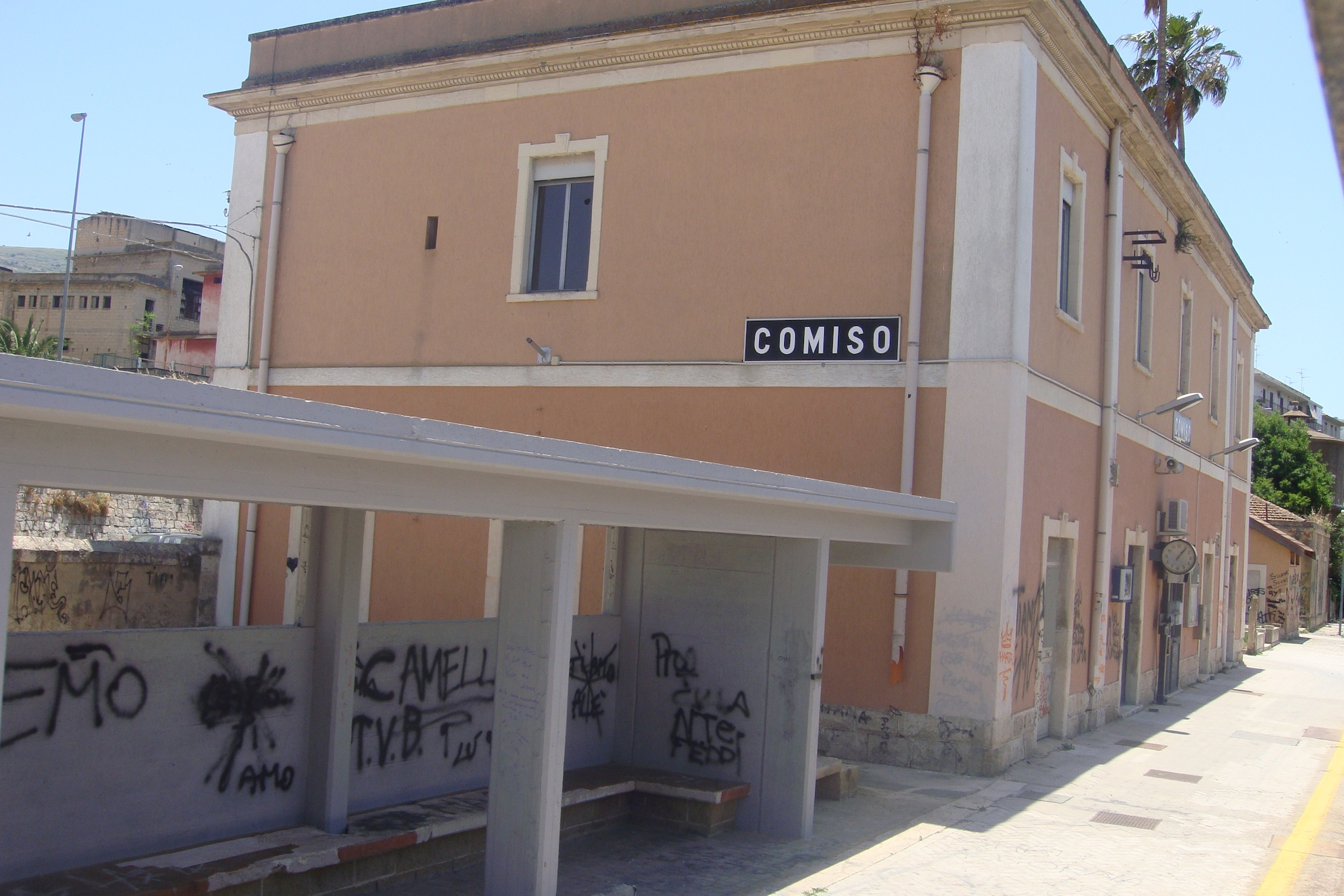 Bahnhof Comiso